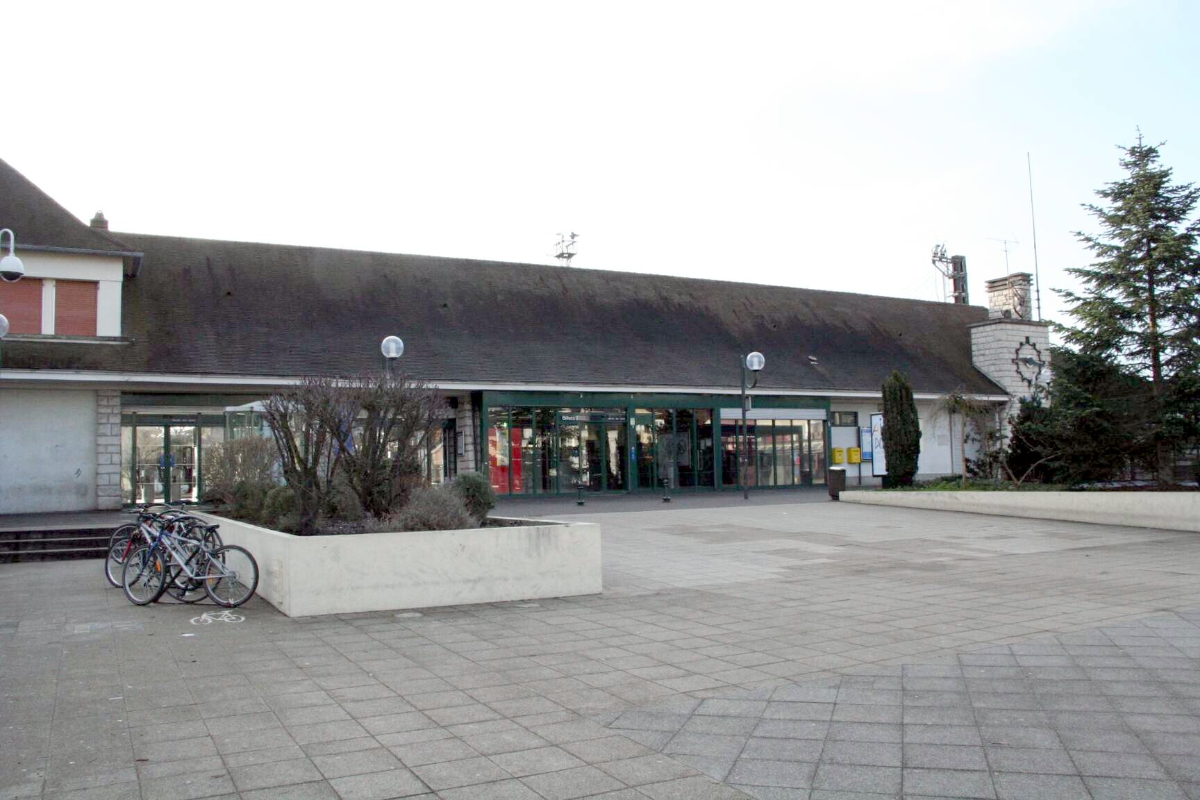 Gare de Rambouillet - Yvelines (France), l'entrée de la gare (façade ouest)